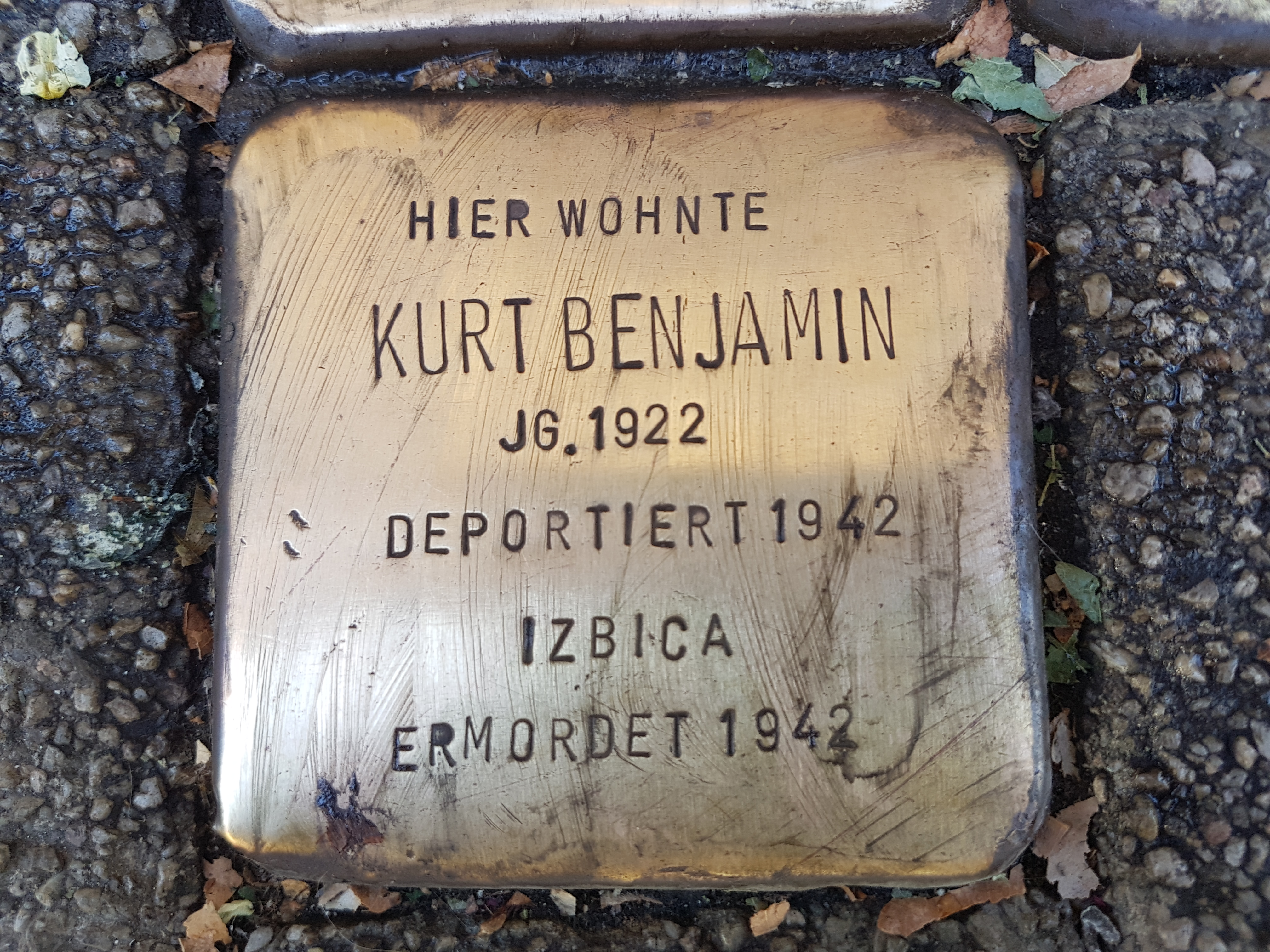 Stolperstein Duisburg Kurt Benjamin